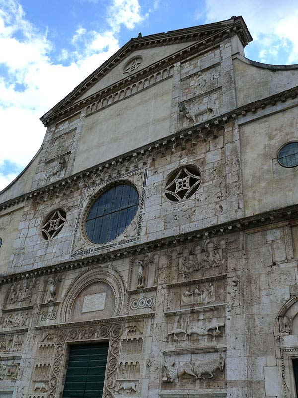 Spoleto: San Pietro church, facade